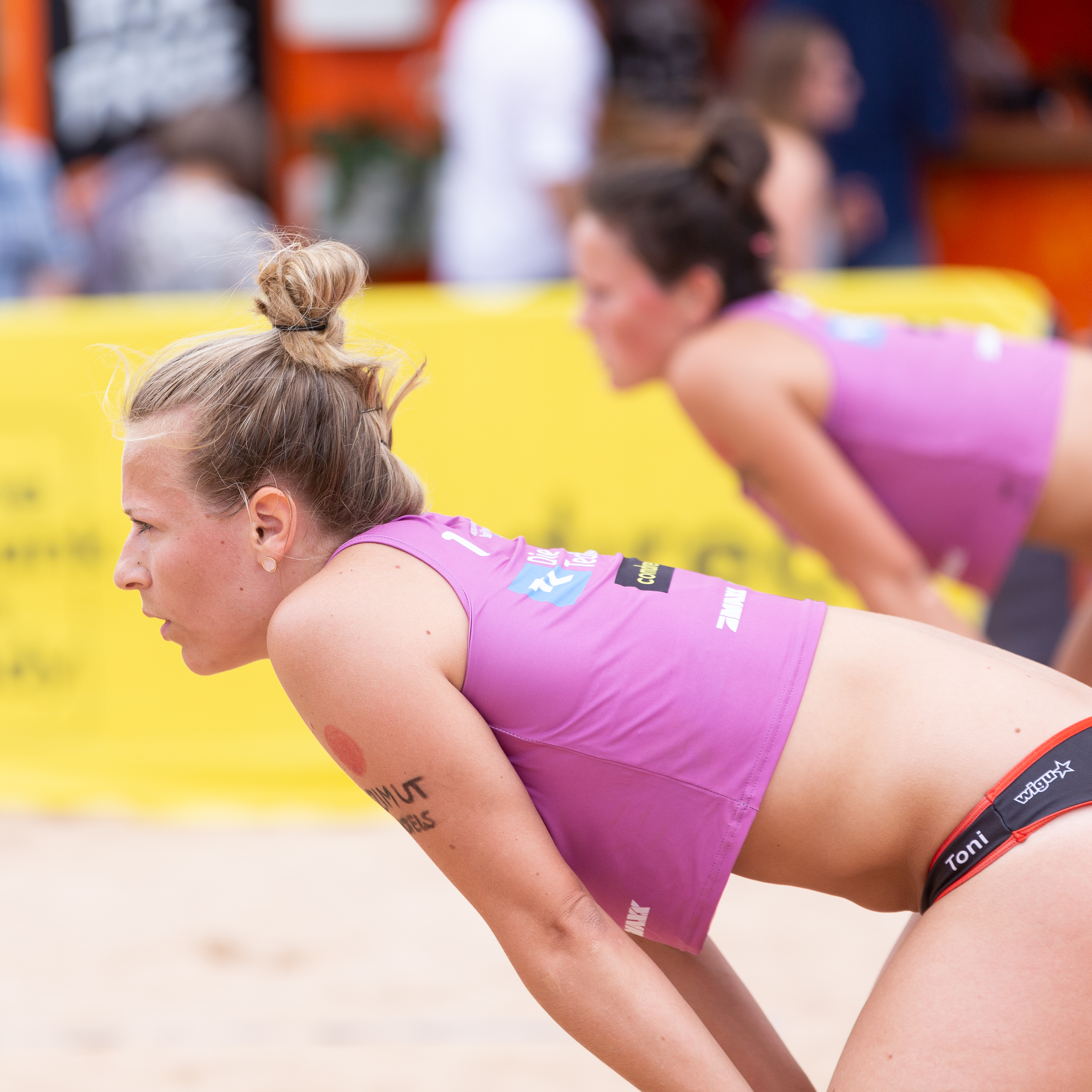 BeachVolleyball, Die Techniker beach tour Nürnberg; Antonia "Toni" Stautz (SC Potsdam)